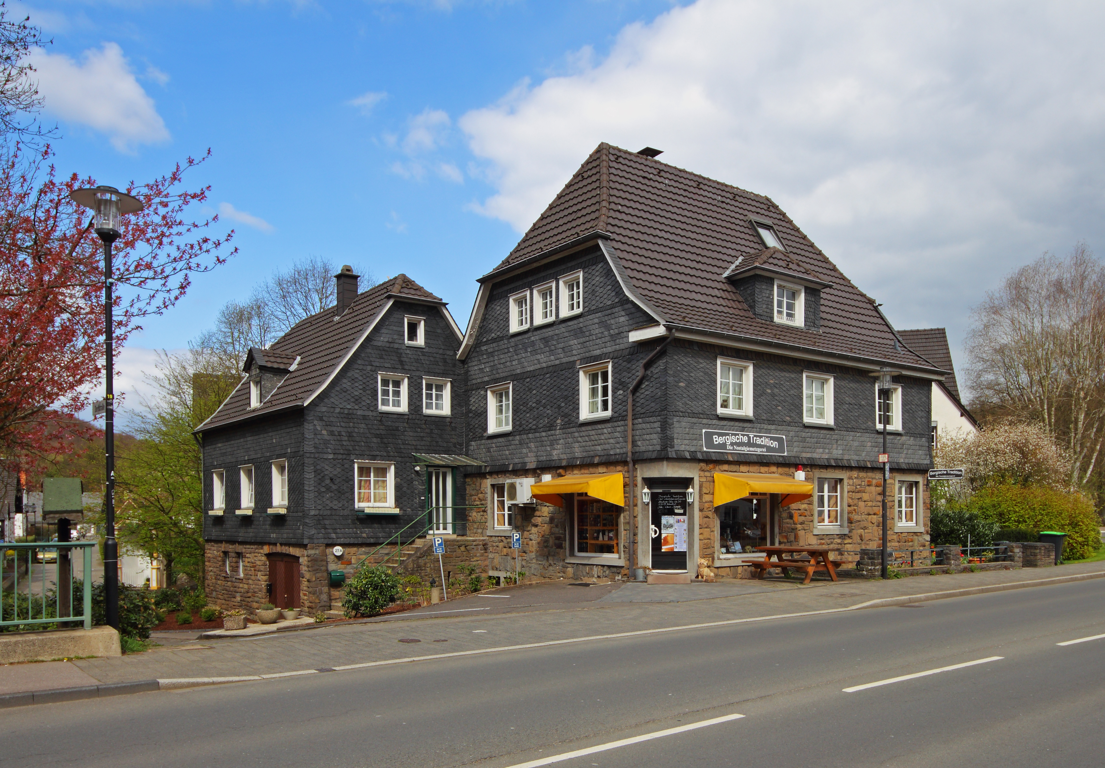 Odenthal, Altenberger Domstraße im Ortskern. Bergisches Haus mit Metzgerei.